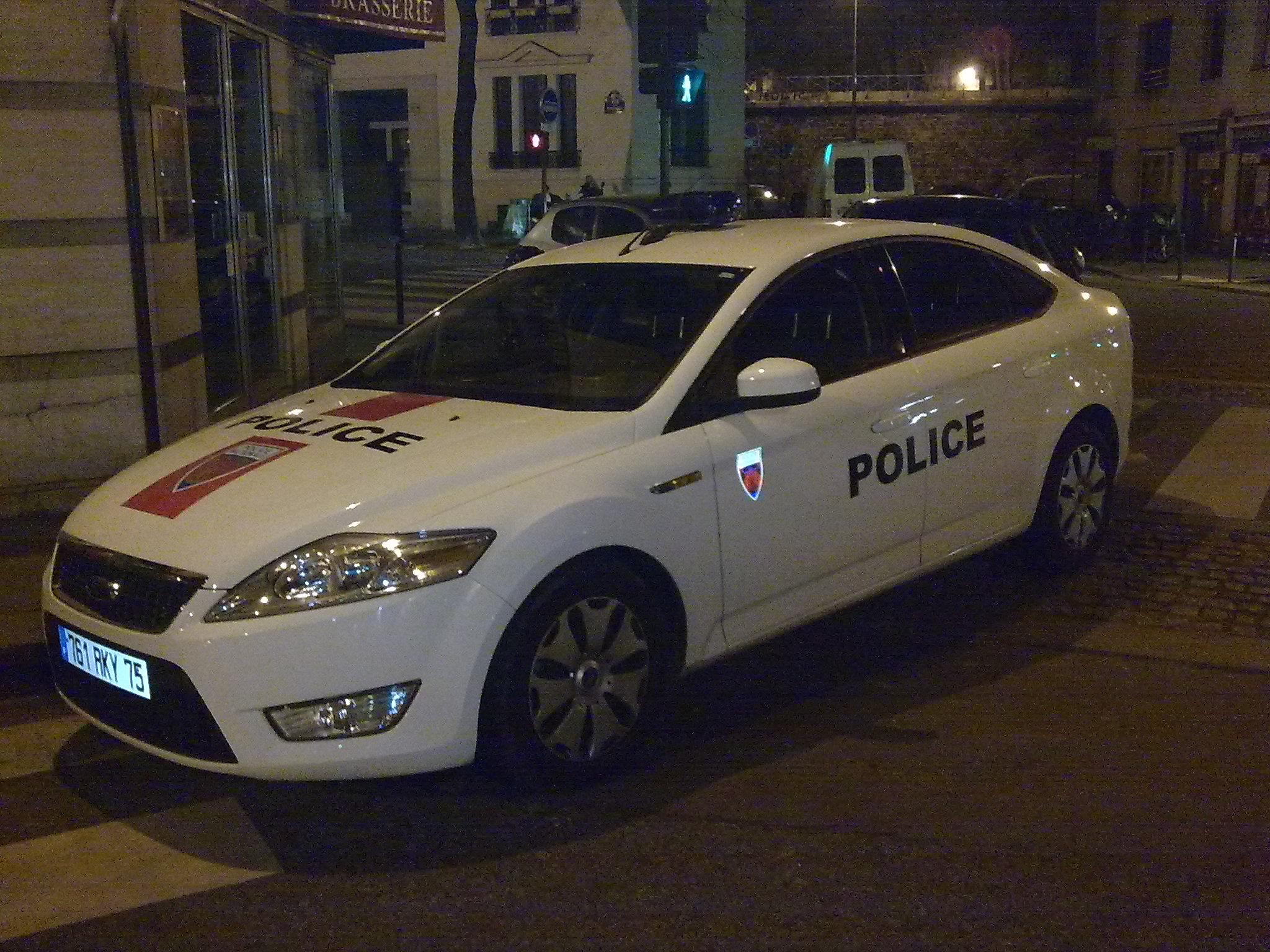 Véhicule BAC 75N, Paris, Fevrier 2009.